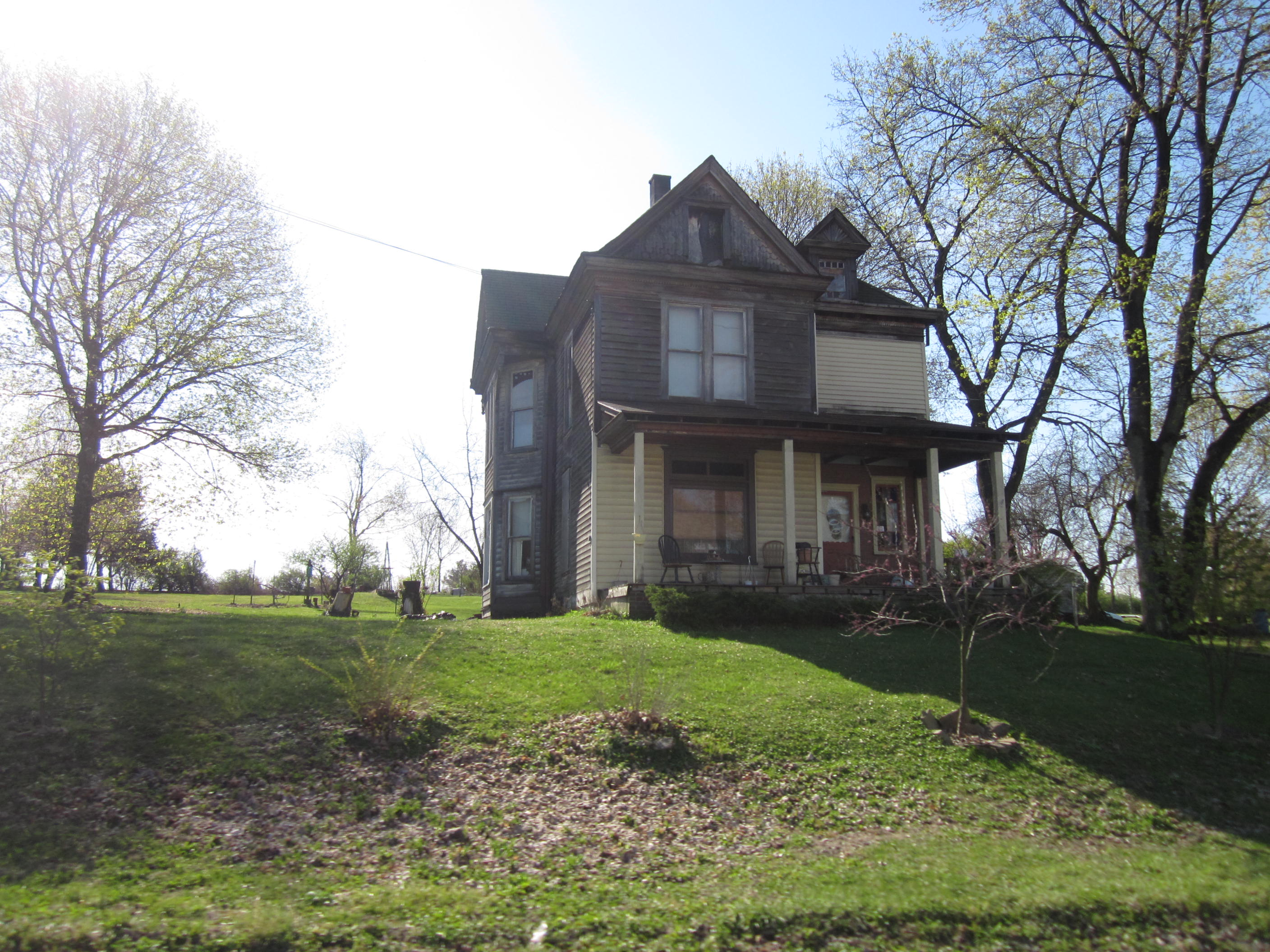 Troutville, Pennsylvania